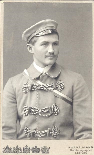 Porträtfotografie von Karl Mehnert als Fuchs des Corps Lusatia Leipzig